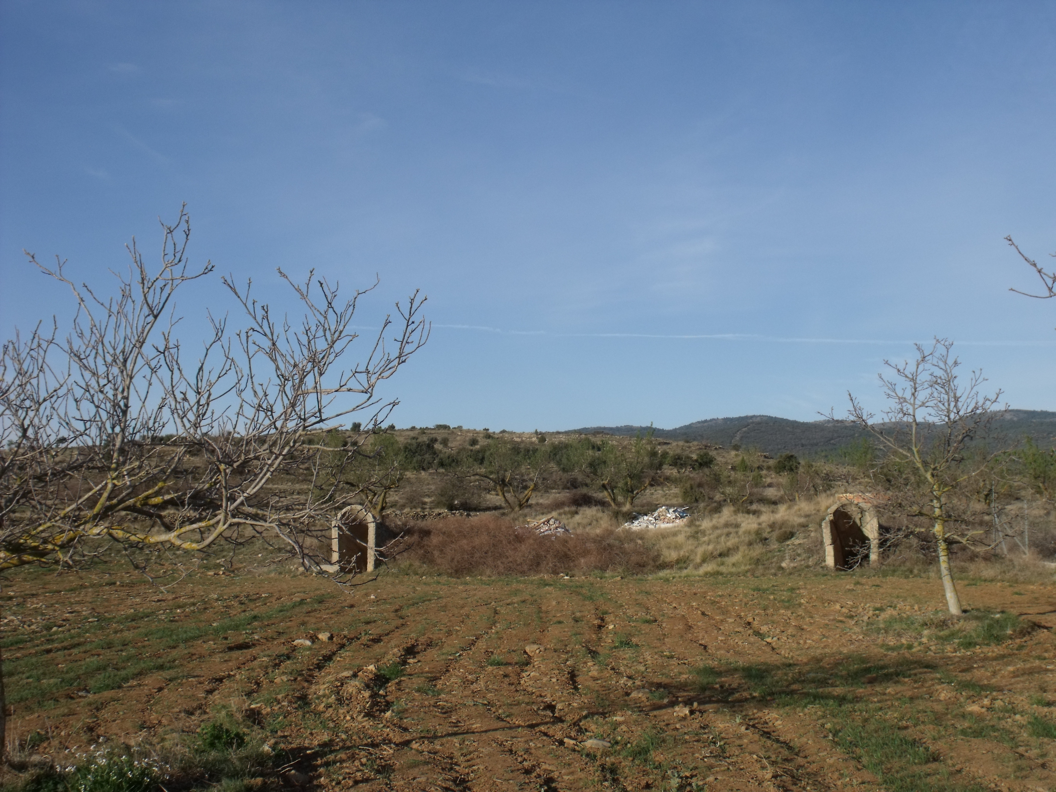 Vista general de las entradas/salidas del refugio antiaéreo del Aeródromo de El Toro